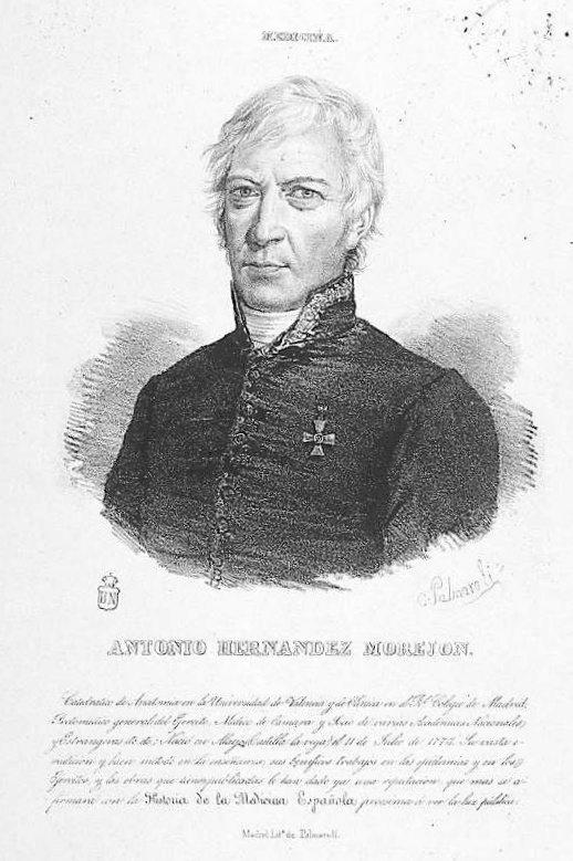 Retrato de Antonio Hernández Morejón, litografía de Cayetano Palmaroli por dibujo propio, Biblioteca Nacional de España